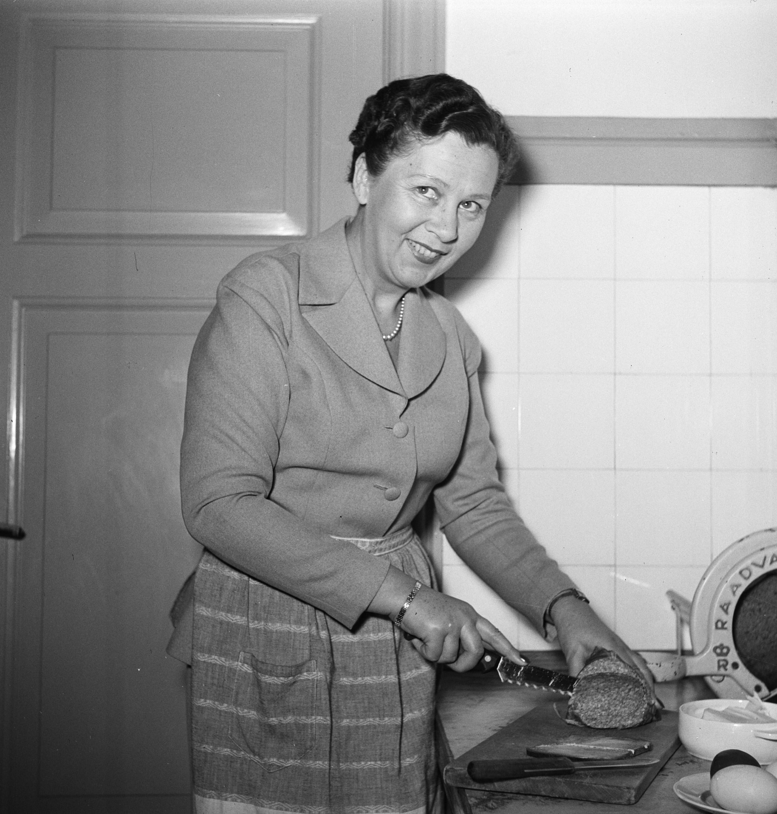 Ella Hedtoft maakt een broodmaaltijd klaar in de keuken